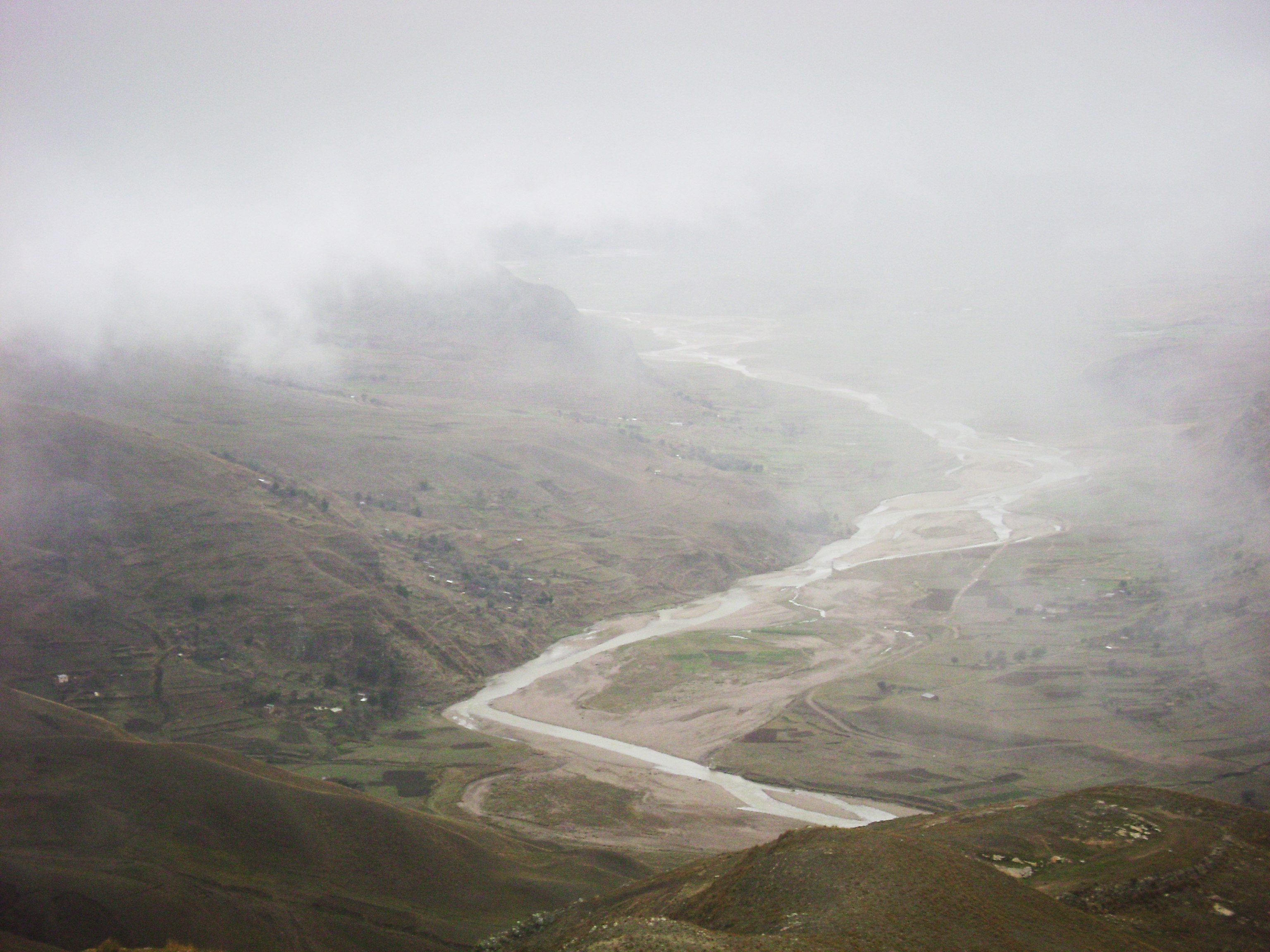 Aymar aru: Aka jamuqax Camacho jisk'a suyutawa. Niya umanata marka jak'awa. Kawkhatix Charazani markar k'añask thakix sarki uka qullu patat jamuqatawa.